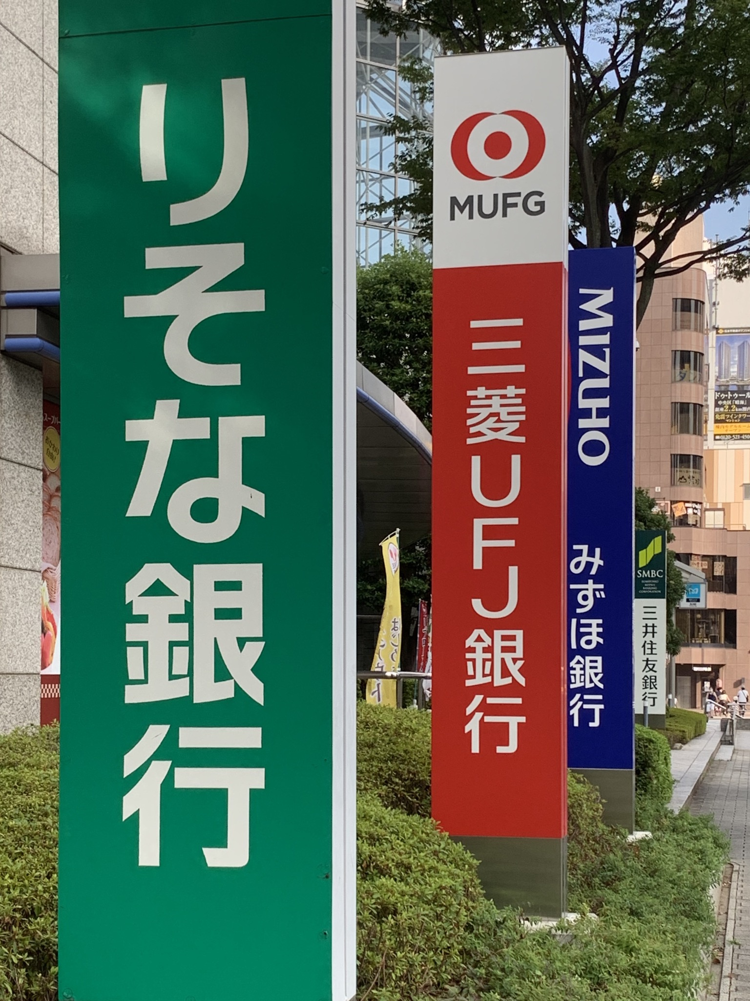 日本のメガバンクの看板。東京都江東区豊洲駅前にある都市銀行の看板を撮影。メディアで「メガバンク」が取り沙汰されるとき、各都市銀行の看板が一覧できる稀有な条件からこの構図の写真が引用されることが多い。なお、圧縮撮影をしていないため手前の看板が見かけ通りに大きく写っている。また、りそな銀行をメガバンクに含めるかは定義による。りそな銀行による定義では、りそな銀行はメガバンクに含まれない。